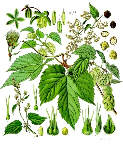 Hopfen. A männlicher, B weiblicher Blüthenstand, nat. Grösse; C Fruchtzweig, desgl.; 1 männliche Blüthe, vergrössert; 2 Perigon der männl. Blüthe, desgl.; 3 Staubgefäss von verschiedenen Seiten, desgl.; 4 Staubgefäss mit geöffnetem Beutel, desgl.; 5 Pollen, desgl.; 6 weibliches Kätzchen, desgl.; 7, 8 Blüthenpaar der weiblichen Blüthe mit Deckblatt von der Rückseite und Vorderseite, desgl.; 9 einzelne Blüthe von der Seite mit Deckblättchen, desgl.; 10 Deckblatt und Deckblättchen vom Blüthenpaare, desgl.; 11, 12 einzelnes Blüthchen mit Deckblättchen, von verschiedenen Seiten, desgl.; 13 ausgewachsenes Deckblättchen mit Frucht, natürl. Grösse; 14 Frucht, desgl.; 15 die vom Perigon umschlossene, mit Harzdrüsen besetzte Frucht, vergrössert; 16, 17 Nüsschen ohne Perigon, von verschiedenen Seiten, desgl.; 18 und 19 Nüsschen im Quer- und Längsschnitt, desgl.; 20 Harzdrüsen, stärker vergrössert.